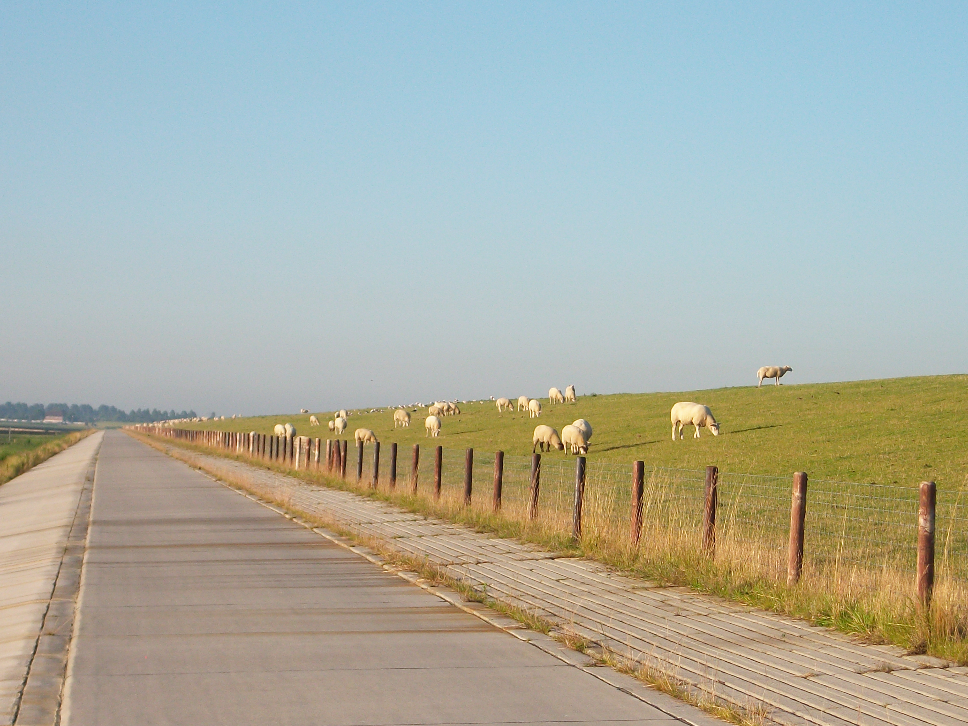 Nasip i prilazna cesta na ulazu u Horumersiel